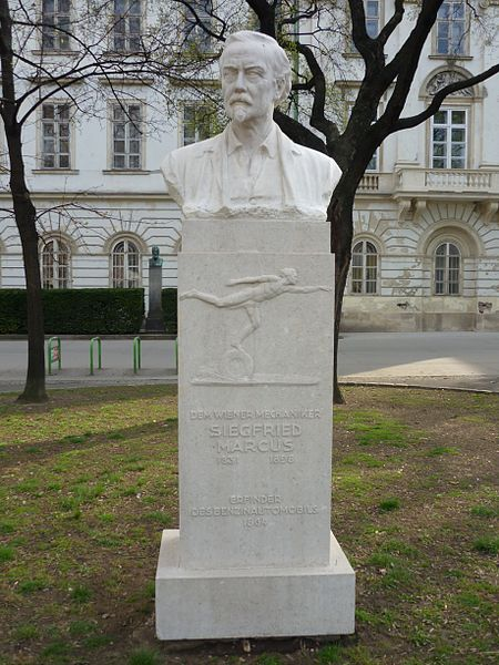 Denkmal von Siegfried Marcus vor der TU Wien